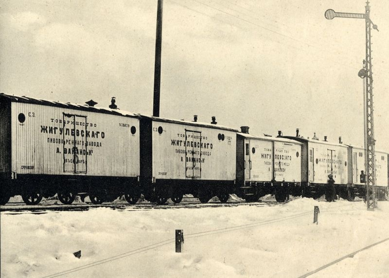 Россия. Вагоны-ледники c жигулевским пивом. 1895-1905гг.